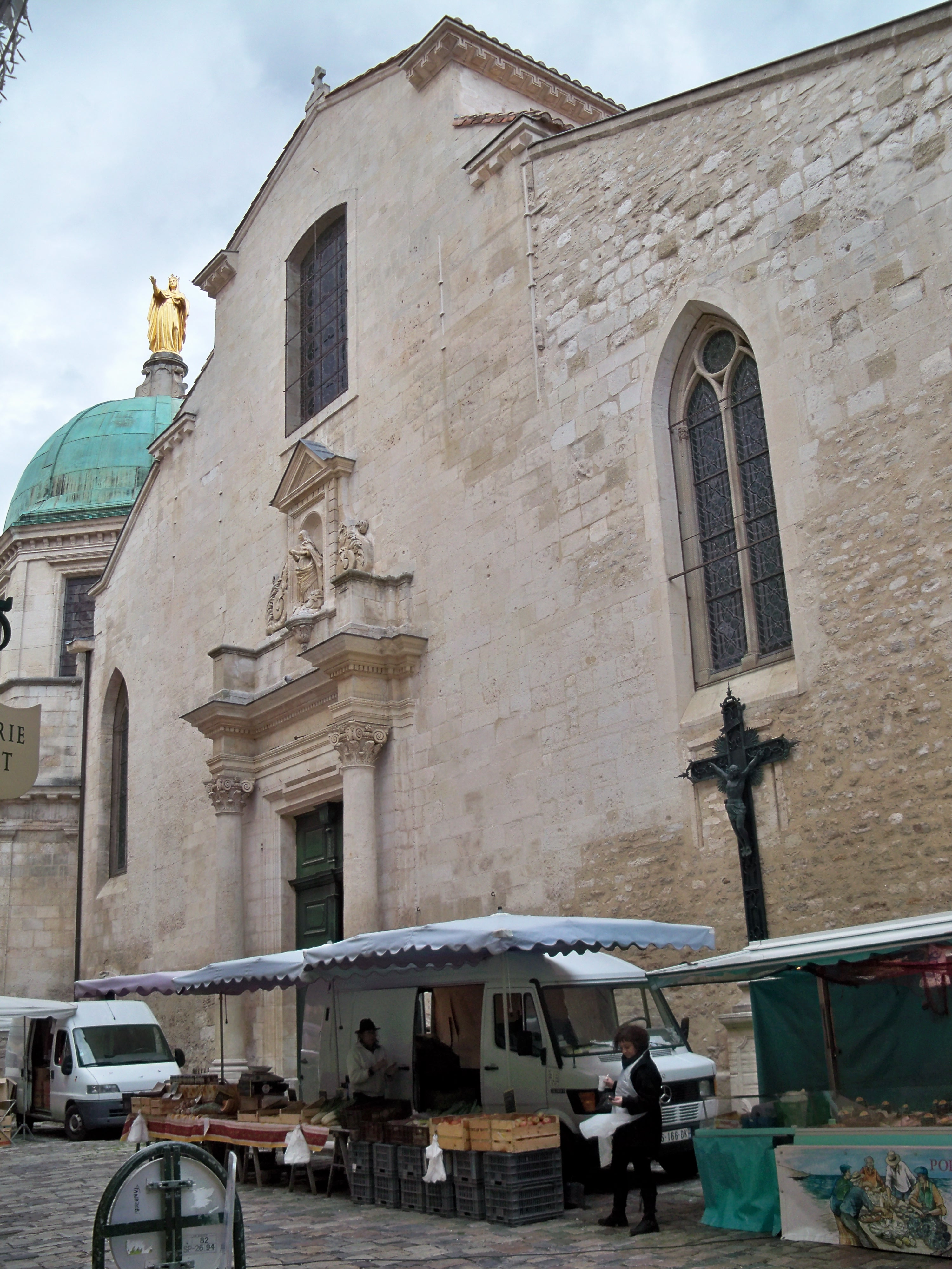 Facade de la cathédrale Sainte Anne à Apt, Vaucluse, France